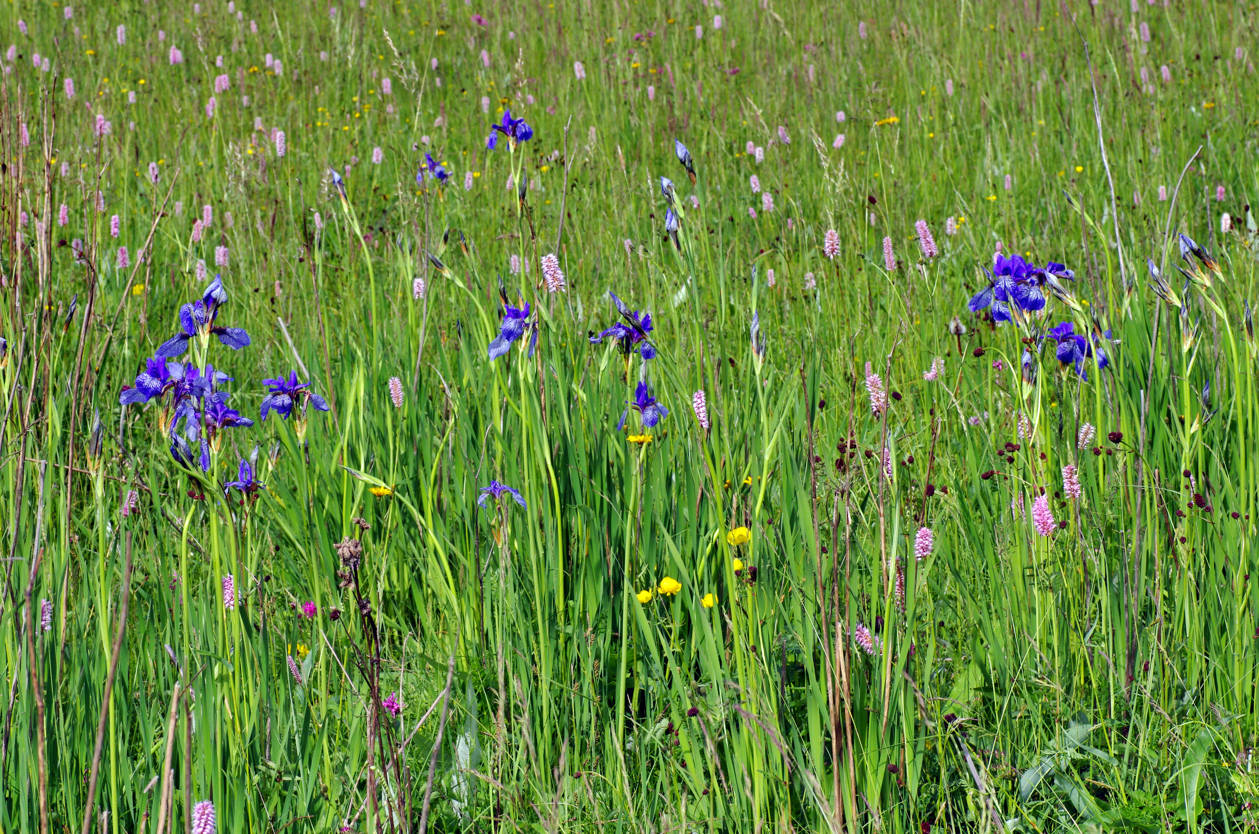 Národní přírodní památka Upolínová louka pod Křížky, Kosatec sibiřský (Iris sibirica), Slavkovský les, okres Cheb